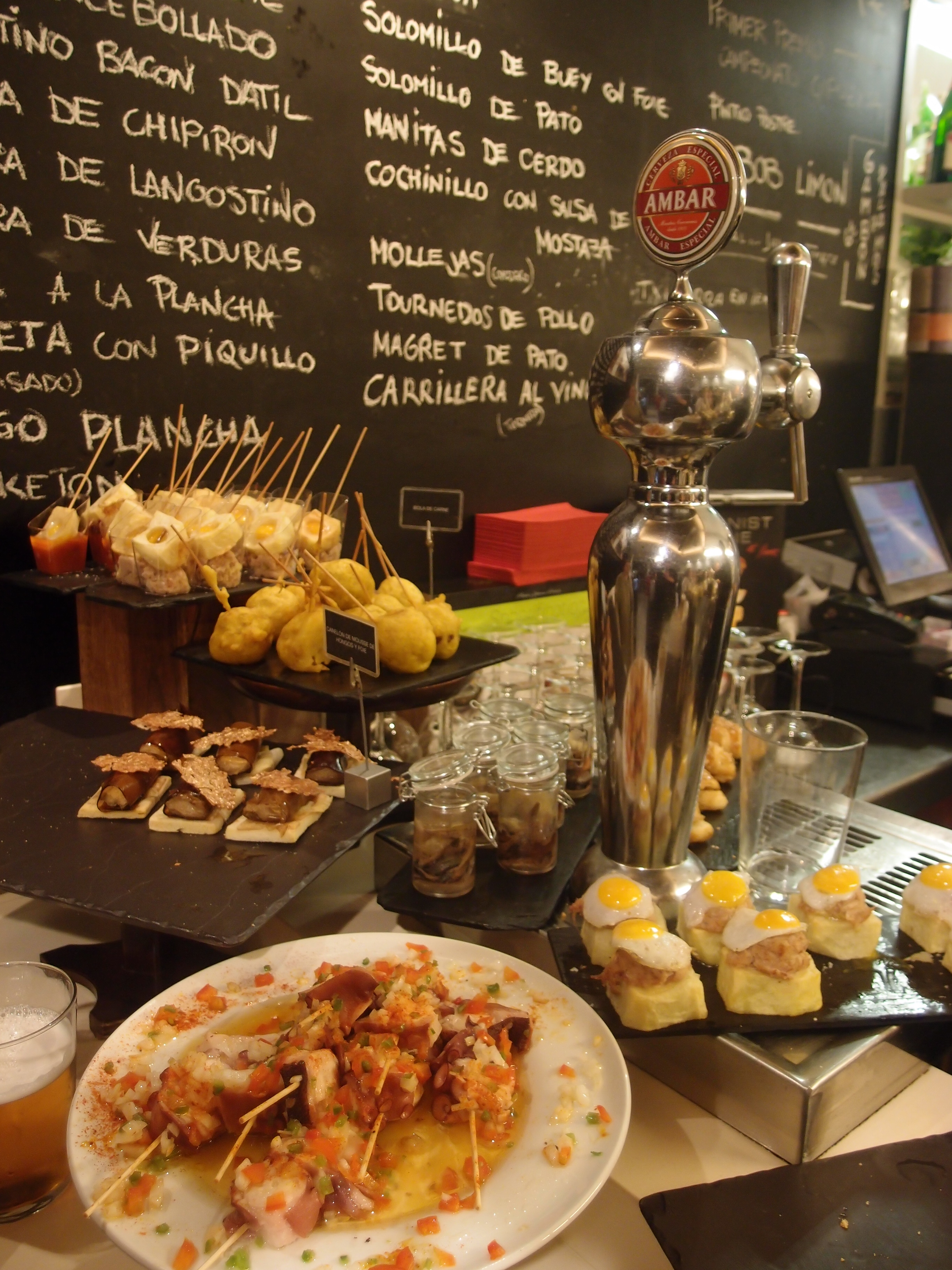 Ambar-Zapfhahn in einer Pintxos-Bar in Donostia-San Sebastian Datum: 08.05.2014 Urheber: M. Pfeiffer alias Gordito1869 Quelle: privates Fotoarchiv des Urhebers